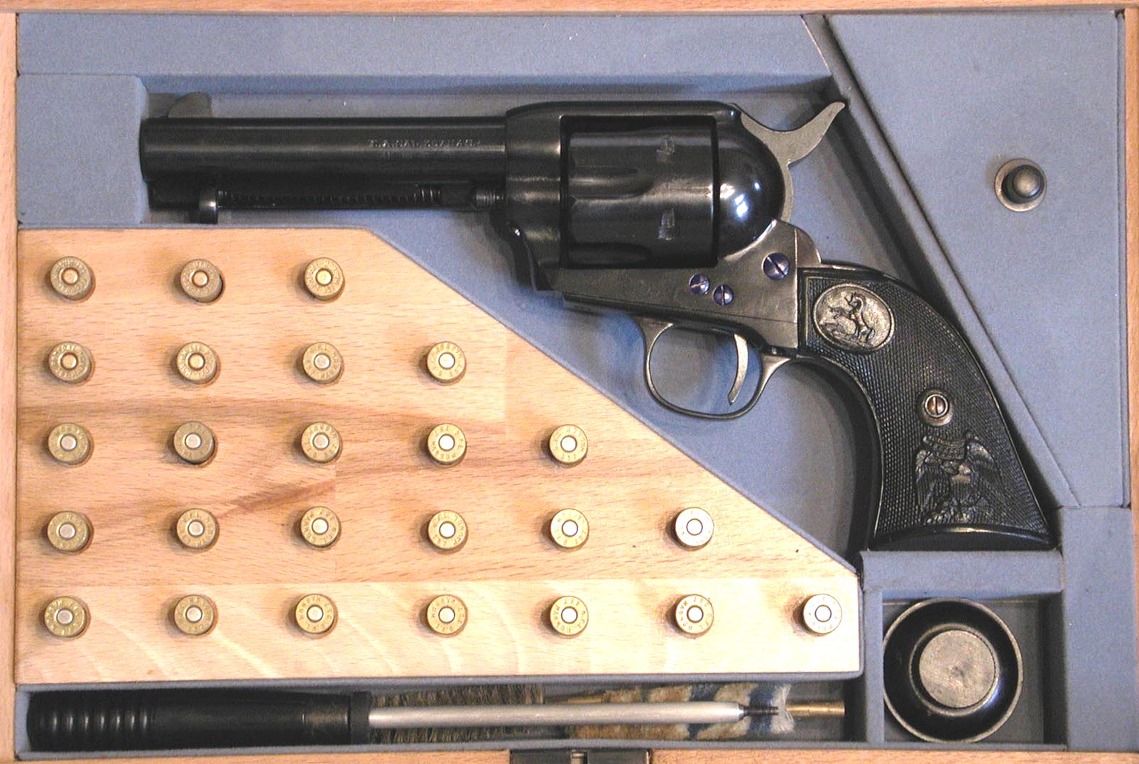 Colt Single Action Army (Fabbricata da A. Uberti)